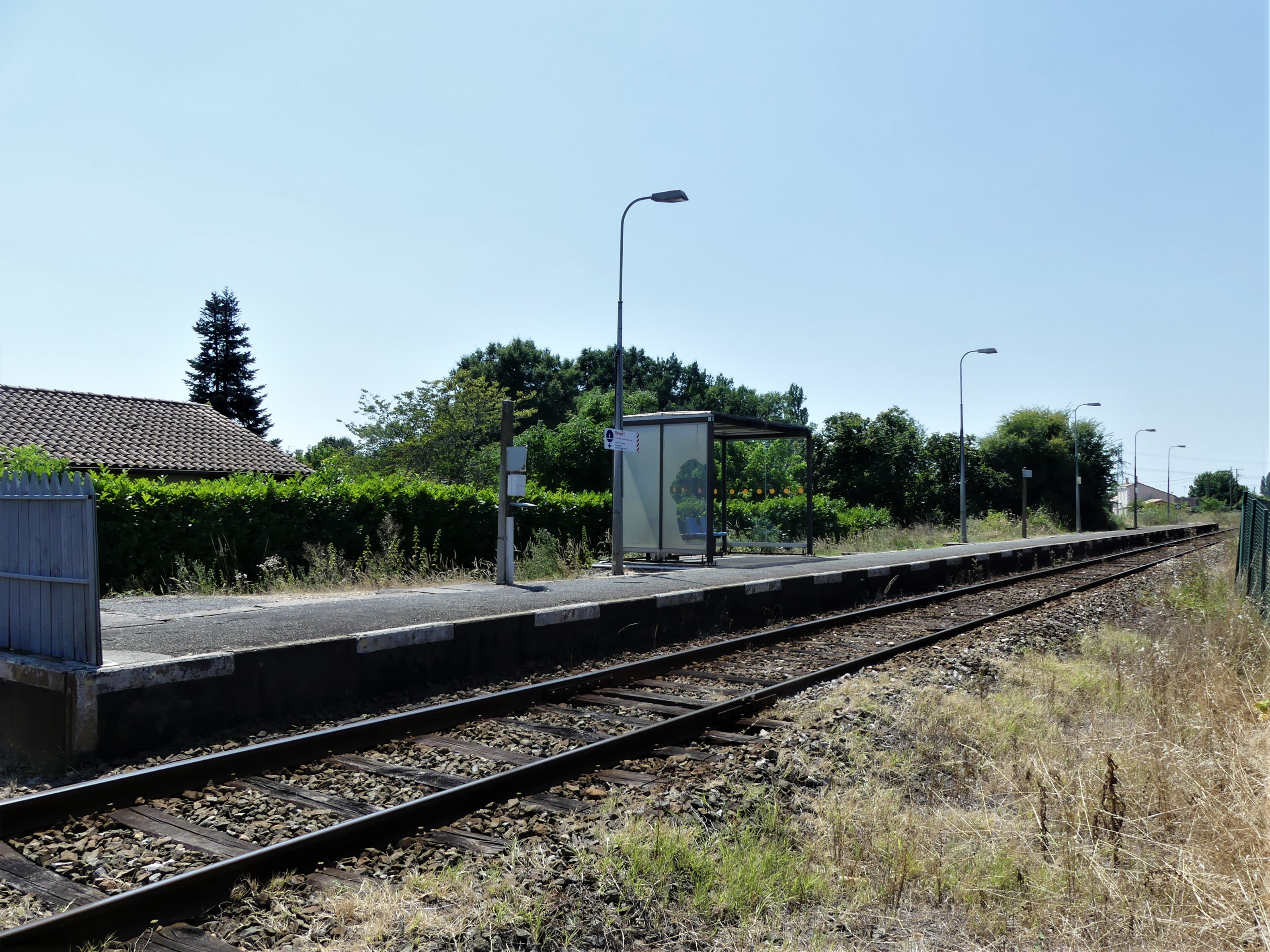 La voie en direction de Libourne, halte ferroviaire de Saint-Antoine-de-Breuilh, Dordogne, France.